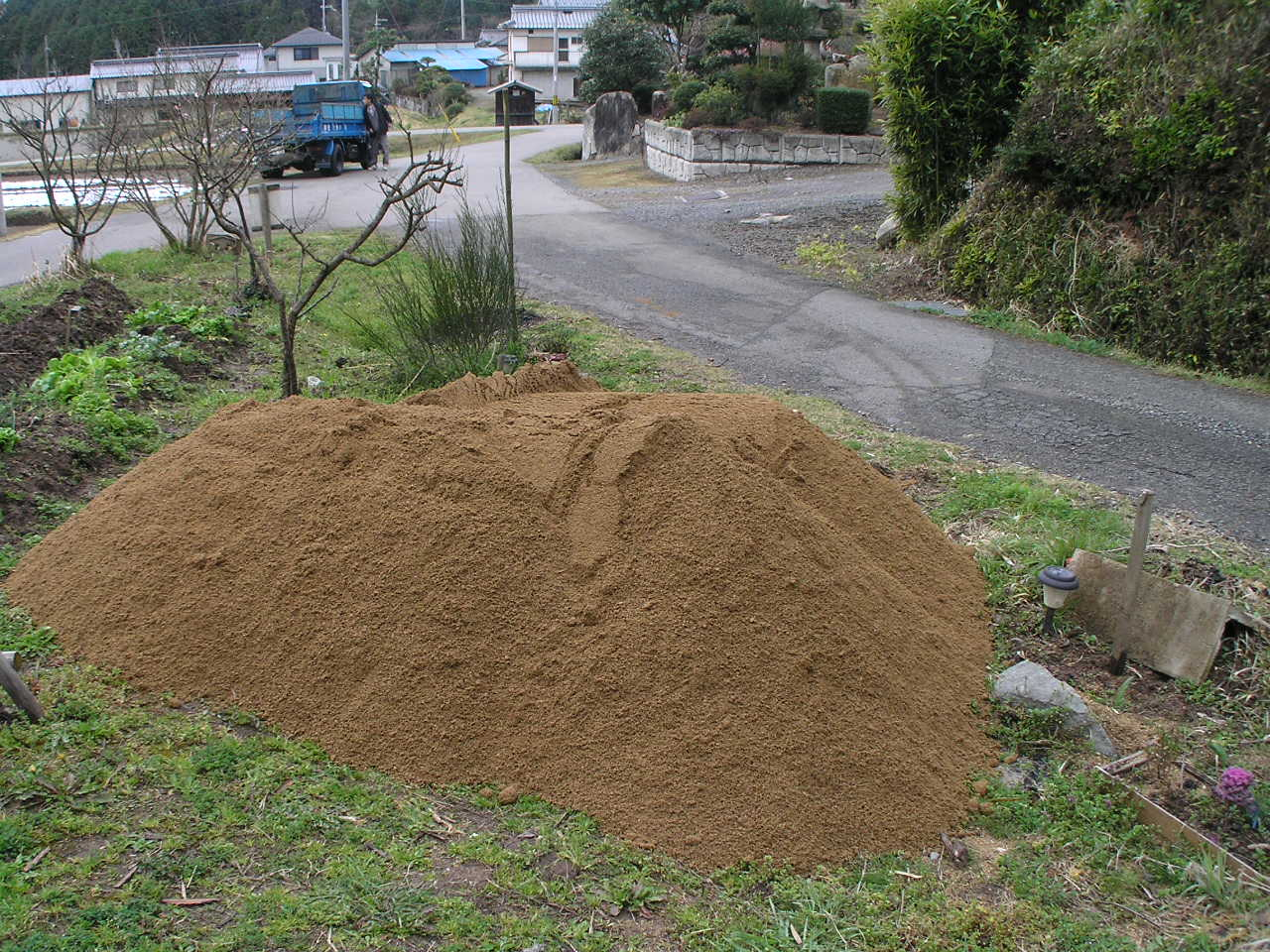 庭土に使われる予定の真砂土